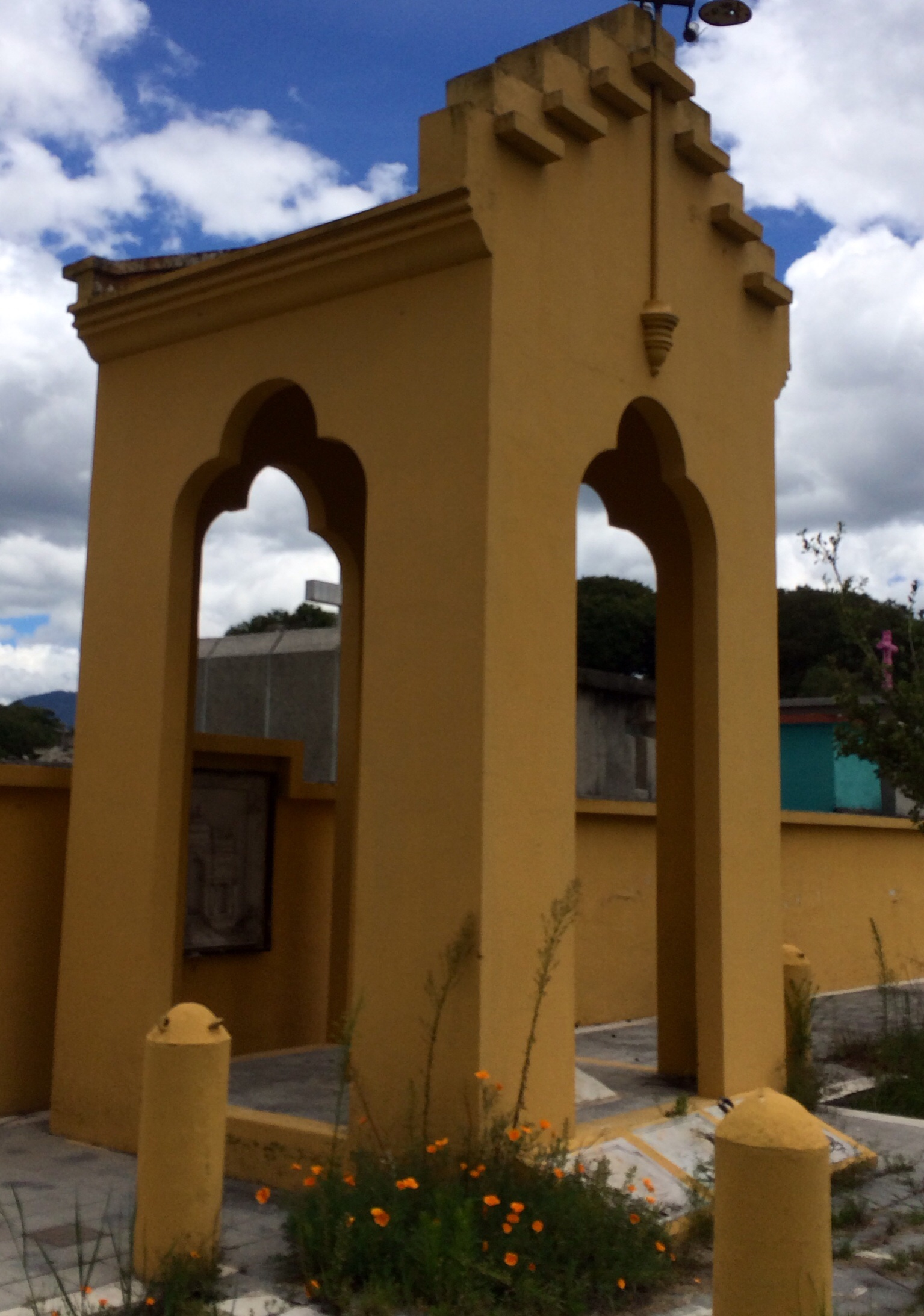 martires97xela